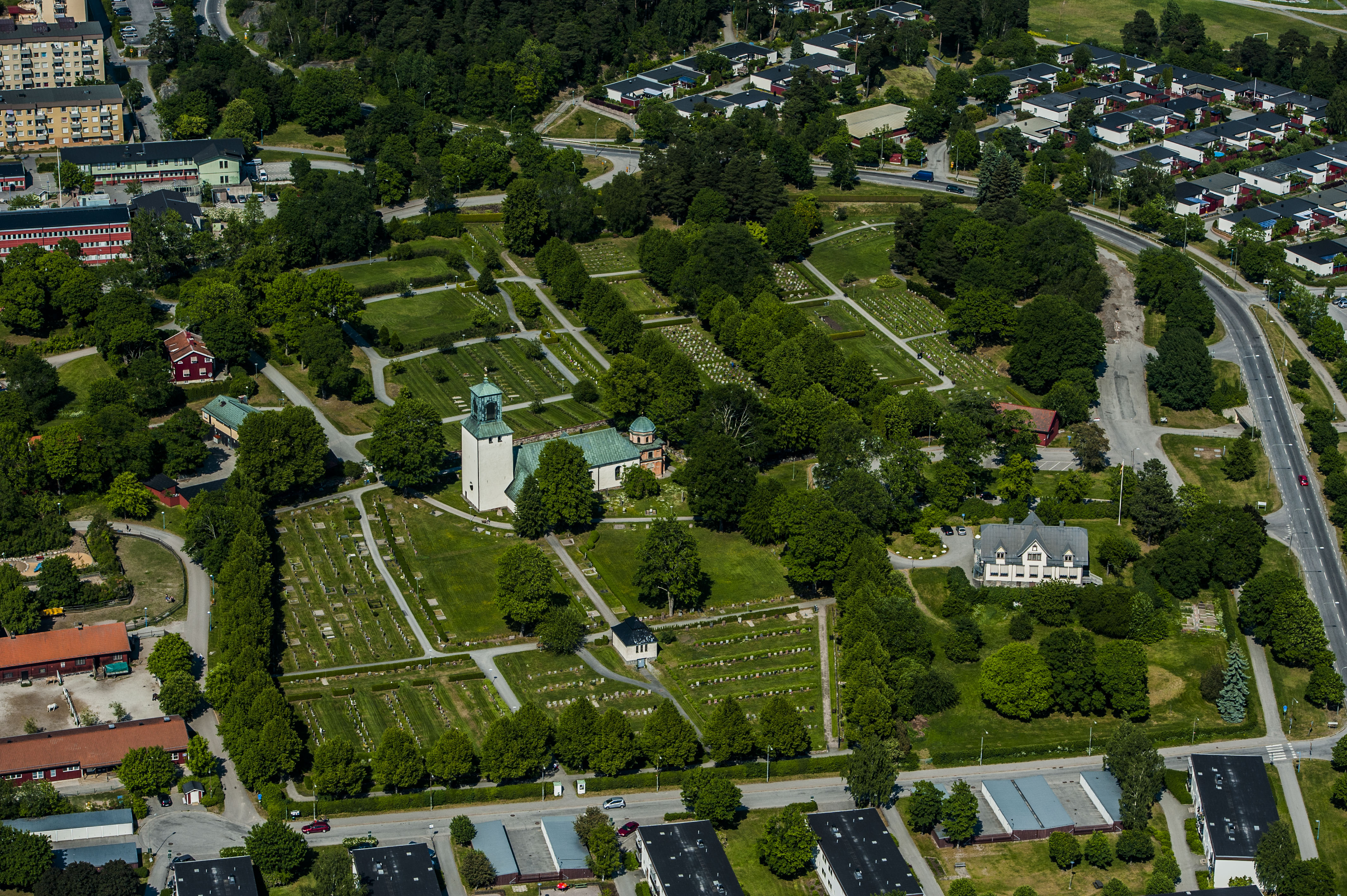 Spånga ka